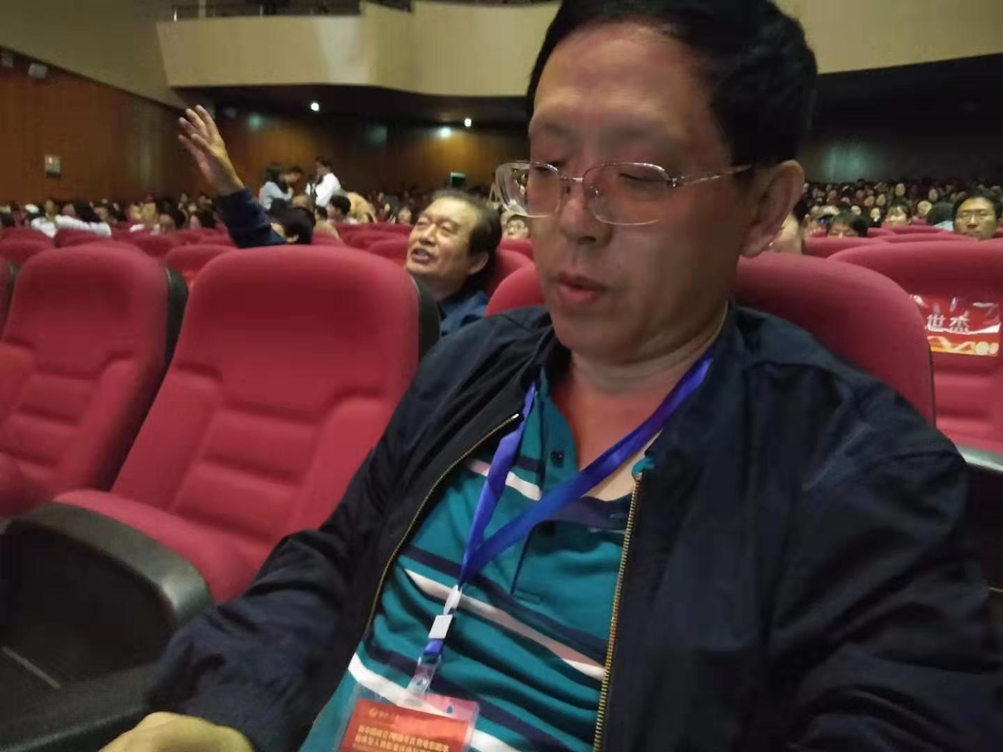 柳建伟，第六届茅盾文学奖得主，2019年9月7日于兰州大学“新中国成立70周年优秀电影剧本和典型人物形象评选与表彰大会”上